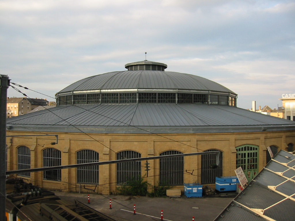 Foto vun der südlecher Rotonde geknipst vum Robby 23:15, 12 Mee 2007 Letzebuerg Rotonde